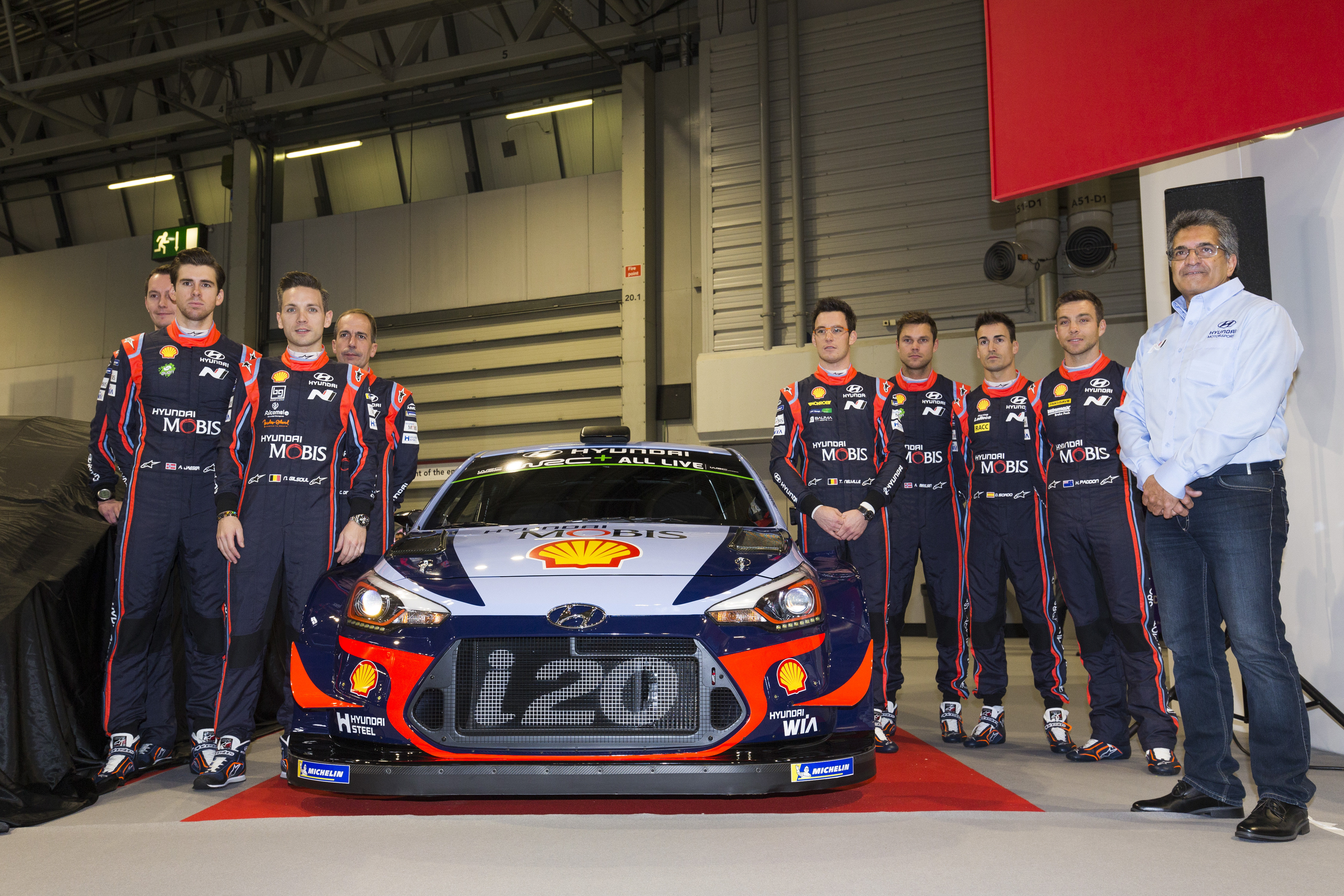 Zespół Hyundia Motorsport WRC w roku 2018